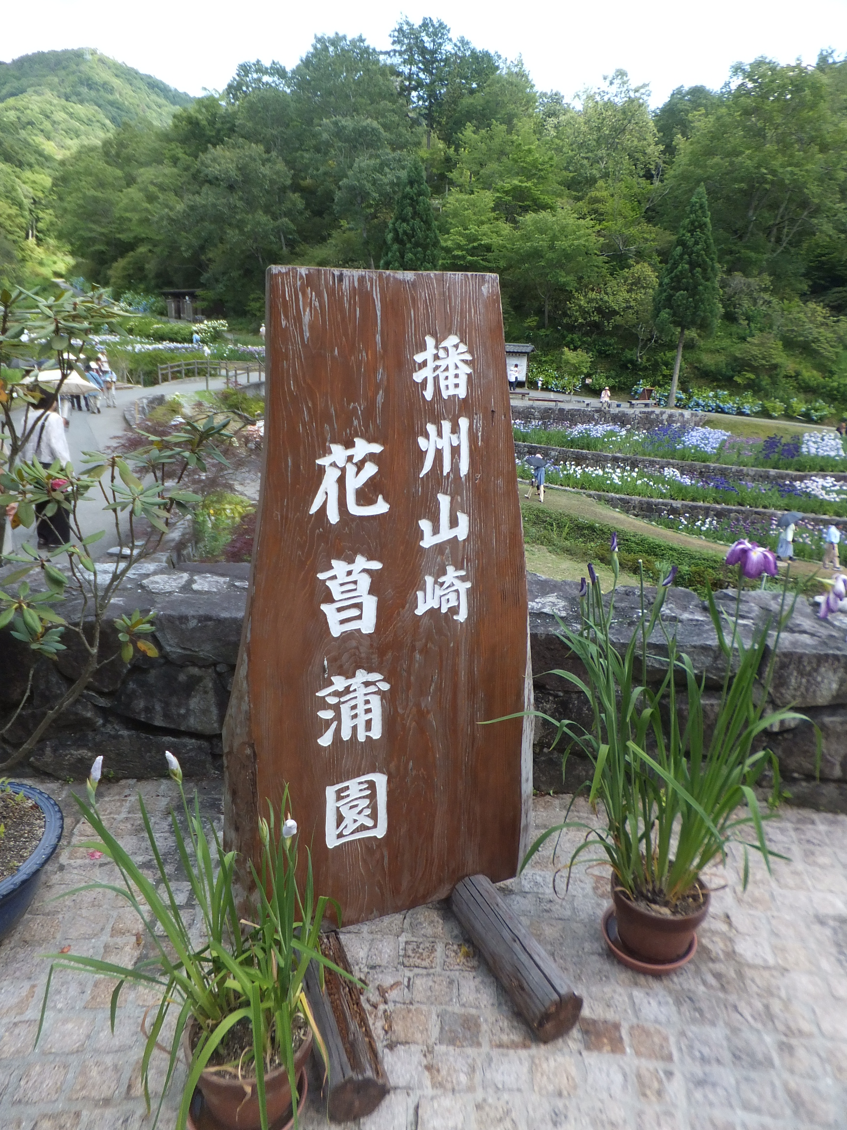 播州山崎花菖蒲園（2013年6月16日）